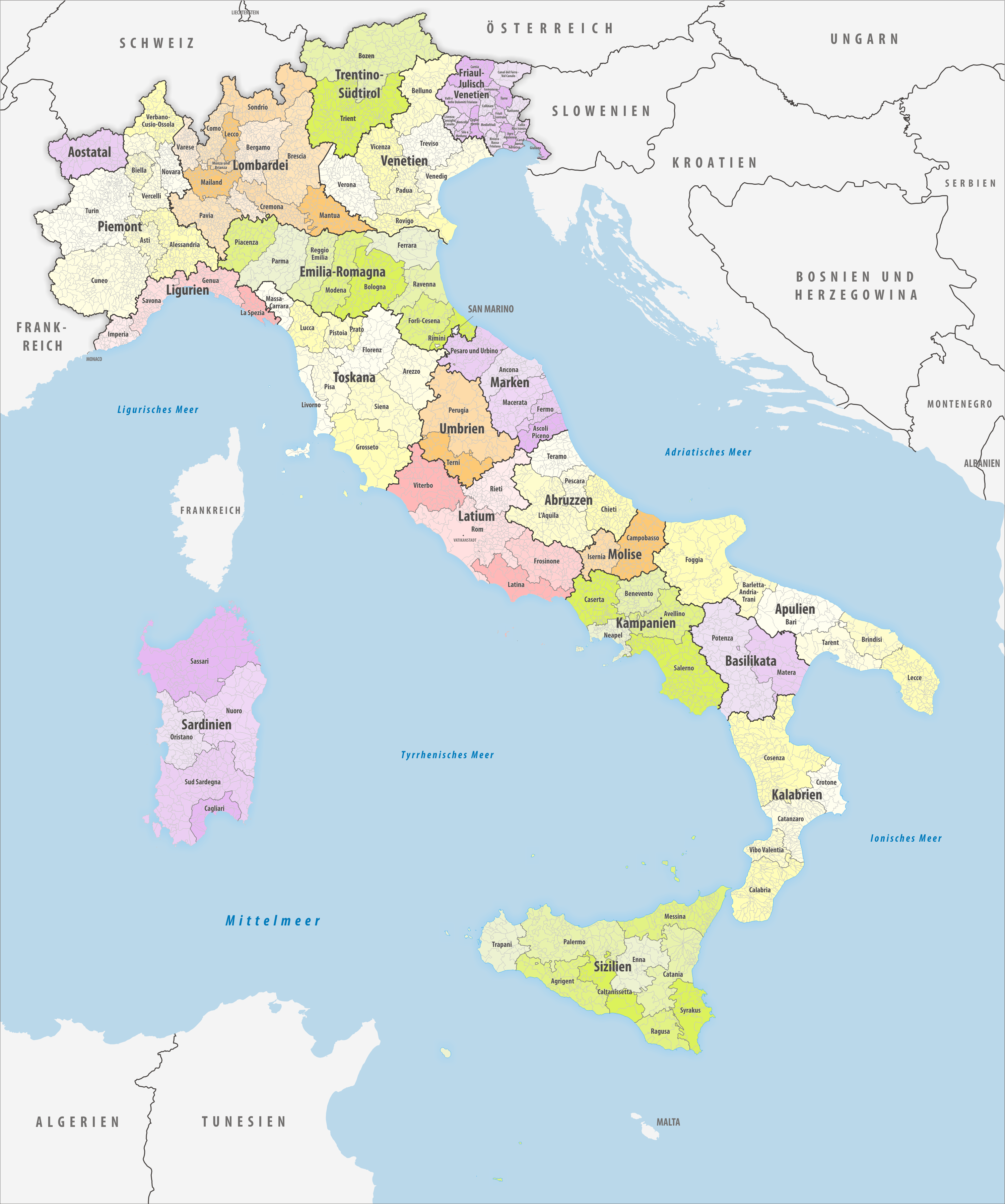 Regionen, Provinzen und Gemeinden in Italien